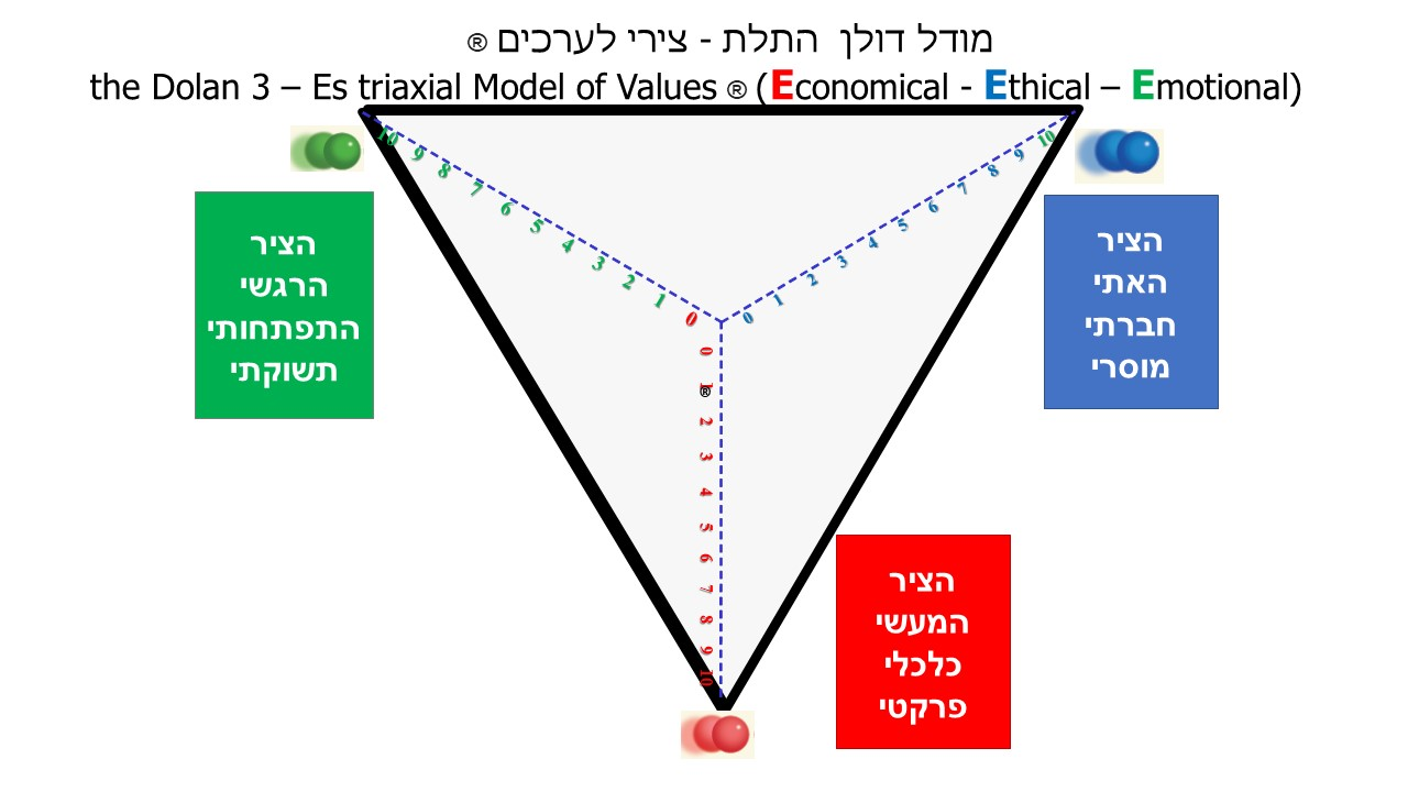 מודל הערכים המשולש